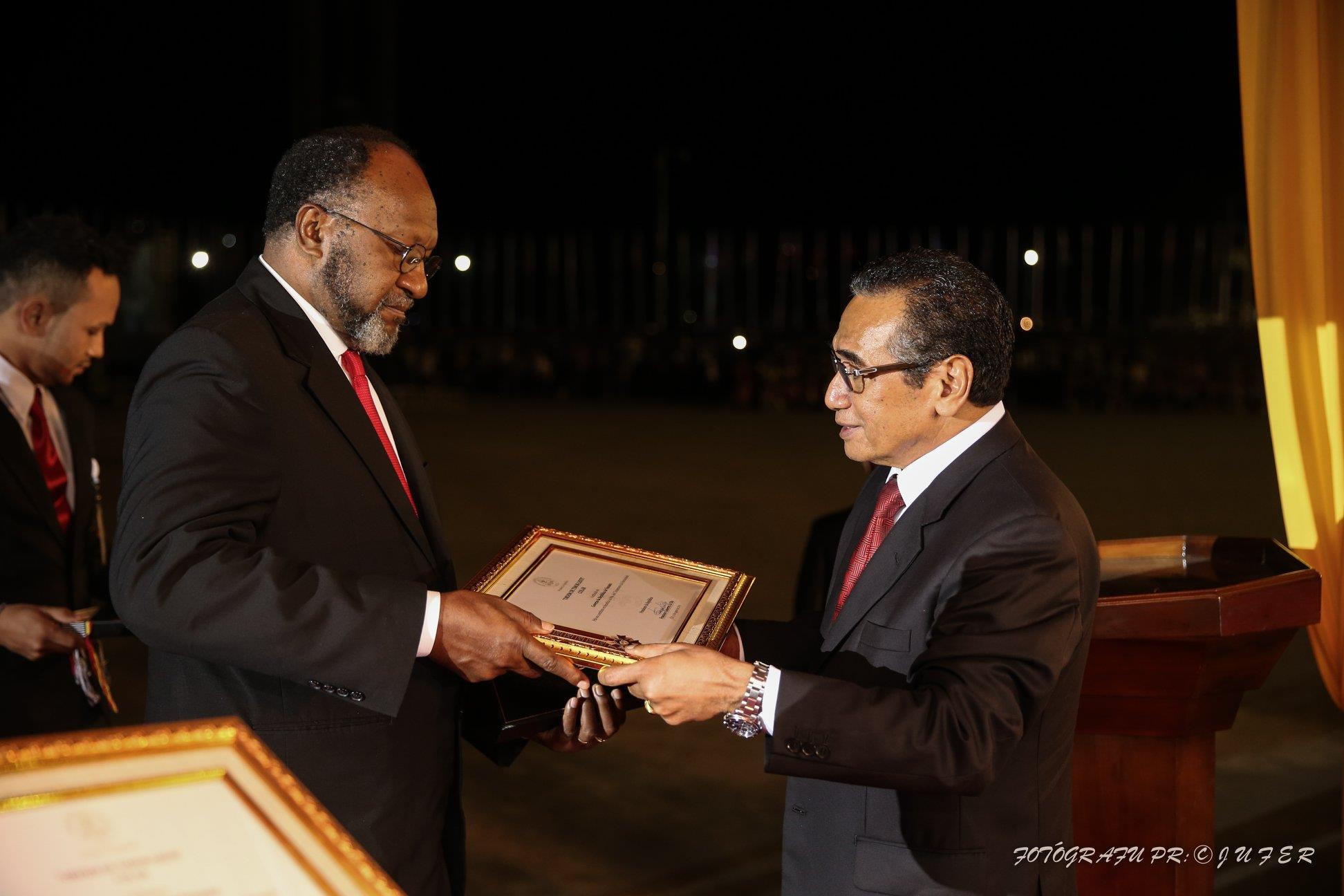 Charlot Salwai bekommt den Ordem de Timor-Leste von Francisco Guterres bei den Feierlichkeiten zum zwanzigsten Jubiläum des Unabhängigkeitsreferendums.